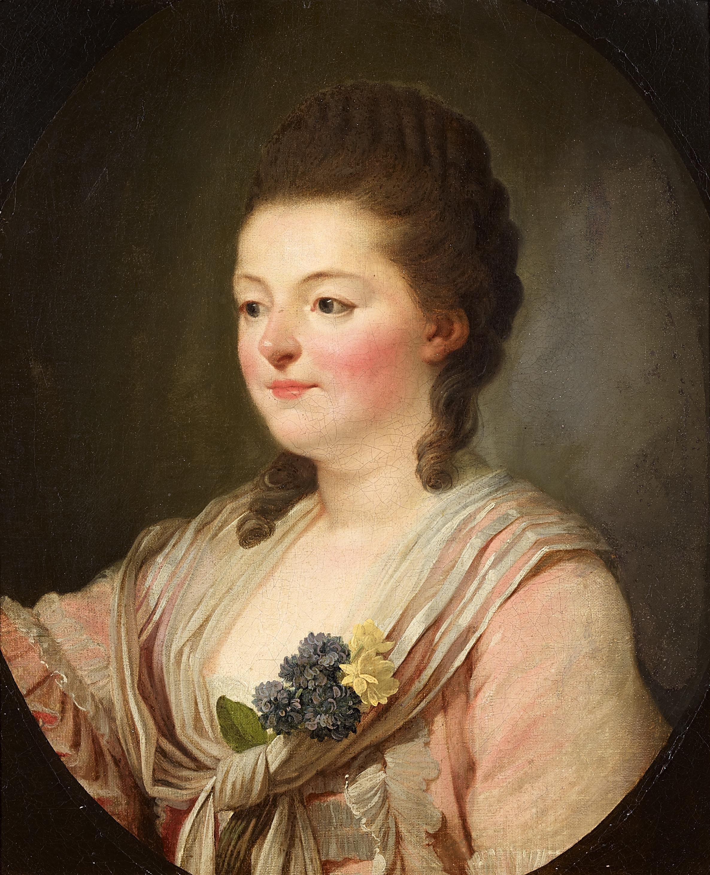 Porträt angeblich der Anna Louise Karsch (1722-1791). 2. Hälfte 18. Jh. Rückseitig auf der Leinwand alt bezeichnet.